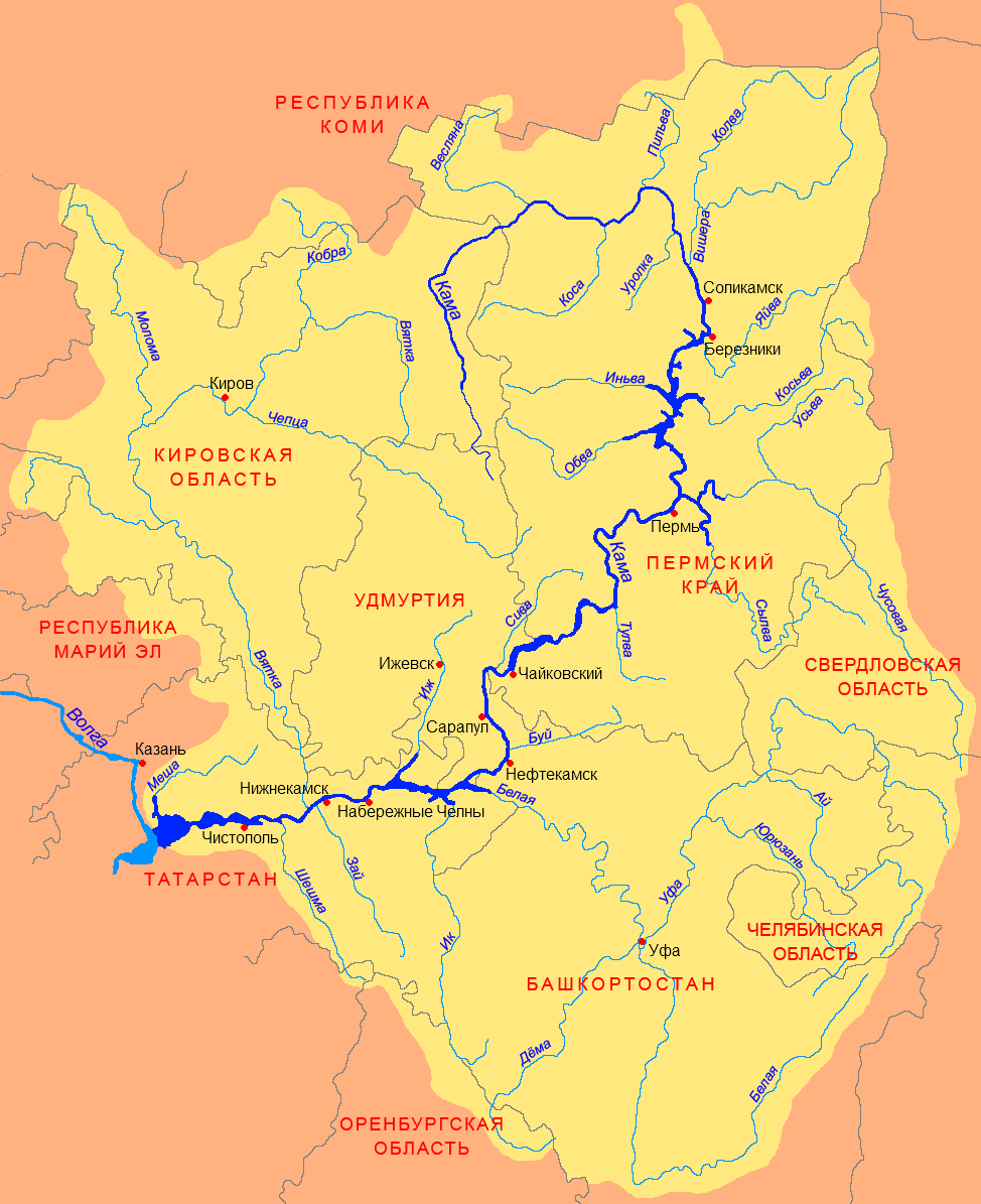 Схема бассейна реки Кама